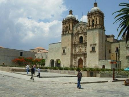 zelfgemaakte foto,14 mei 2007: Oaxaca, Santo Domingo de Guzman